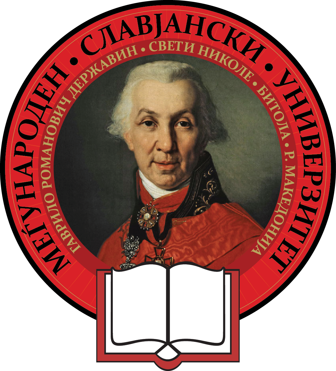 Грбот на МСУ.